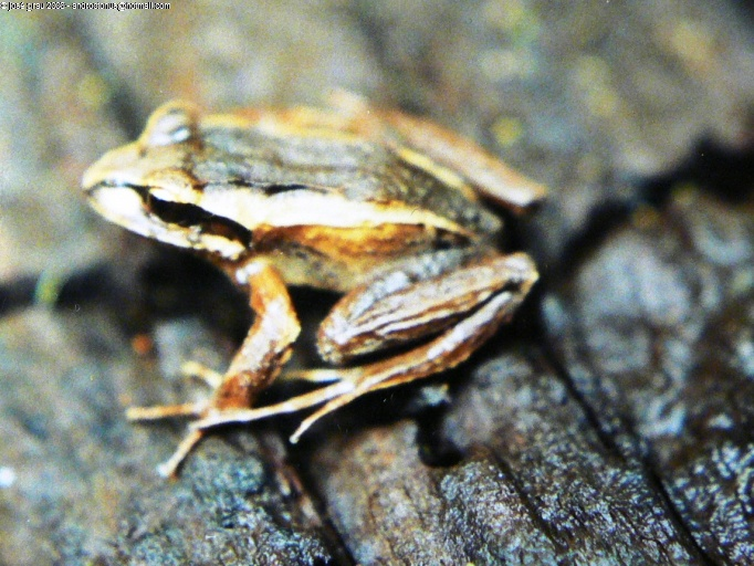 Sapito de antifaz (Batrachyla teniata).